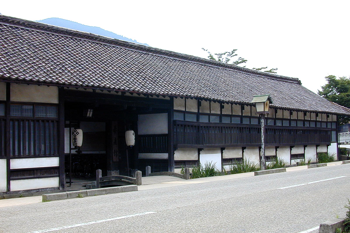 津和野町養老館 武術教場。現在は津和野町立民俗資料館。